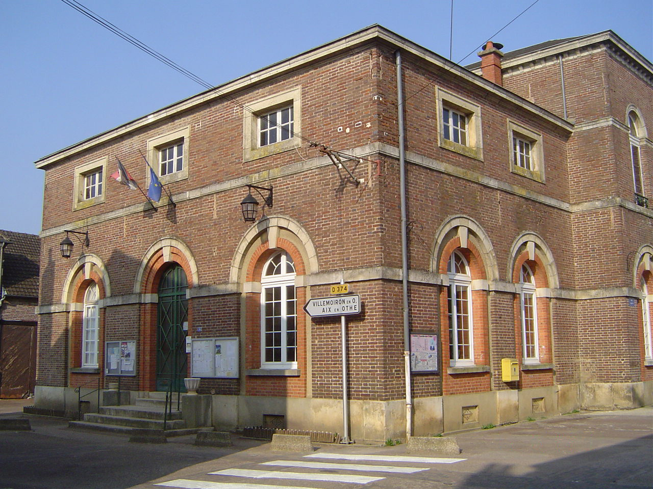 Saint-Mards-en-Othe - La mairie